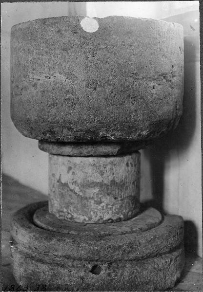 Dopfunt av sten. Ingen inskription eller ornamentering. 1200-talet (?). Räddades undan branden 1945. Kategori: (04) DopfuntarDopfunt av sten. Ingen inskription eller ornamentering. 1200-talet (?). Räddades undan branden 1945.